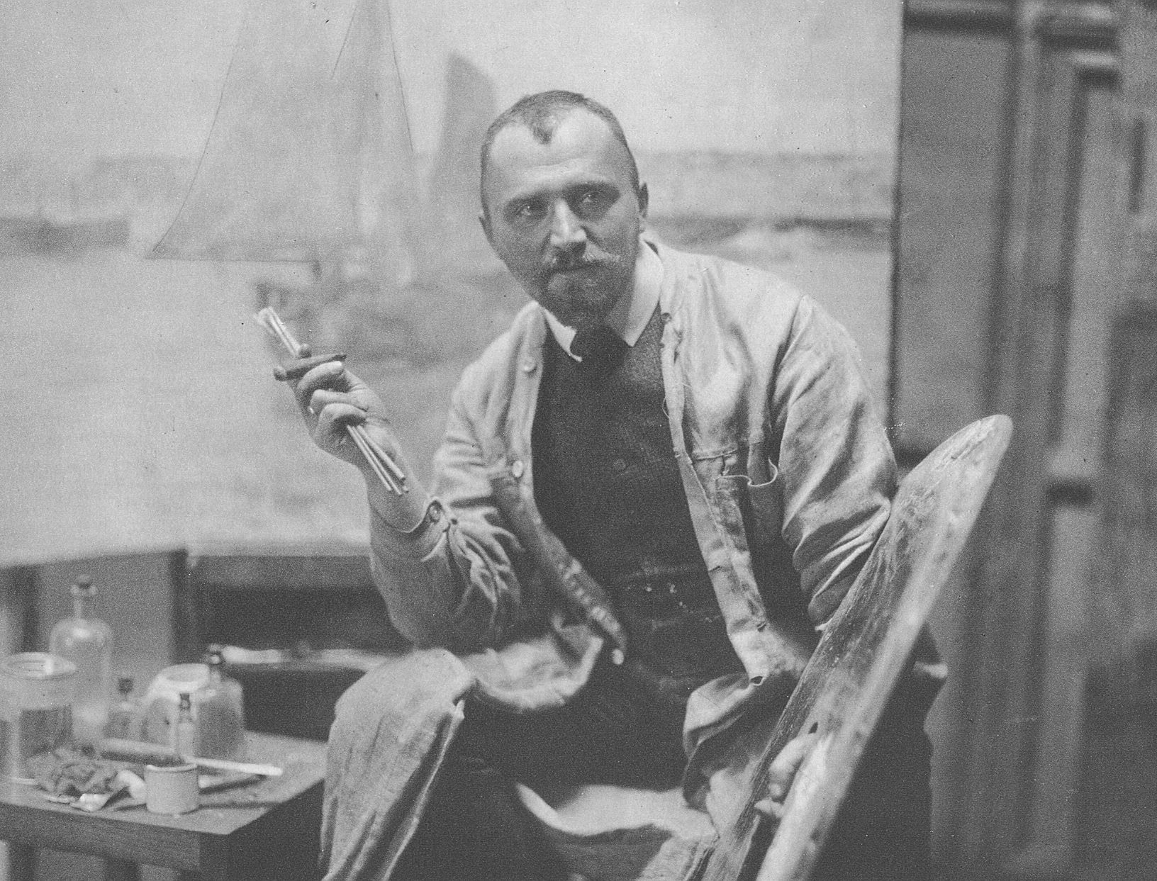 Arthur Siebelist (1870–1945), Hamburger Maler